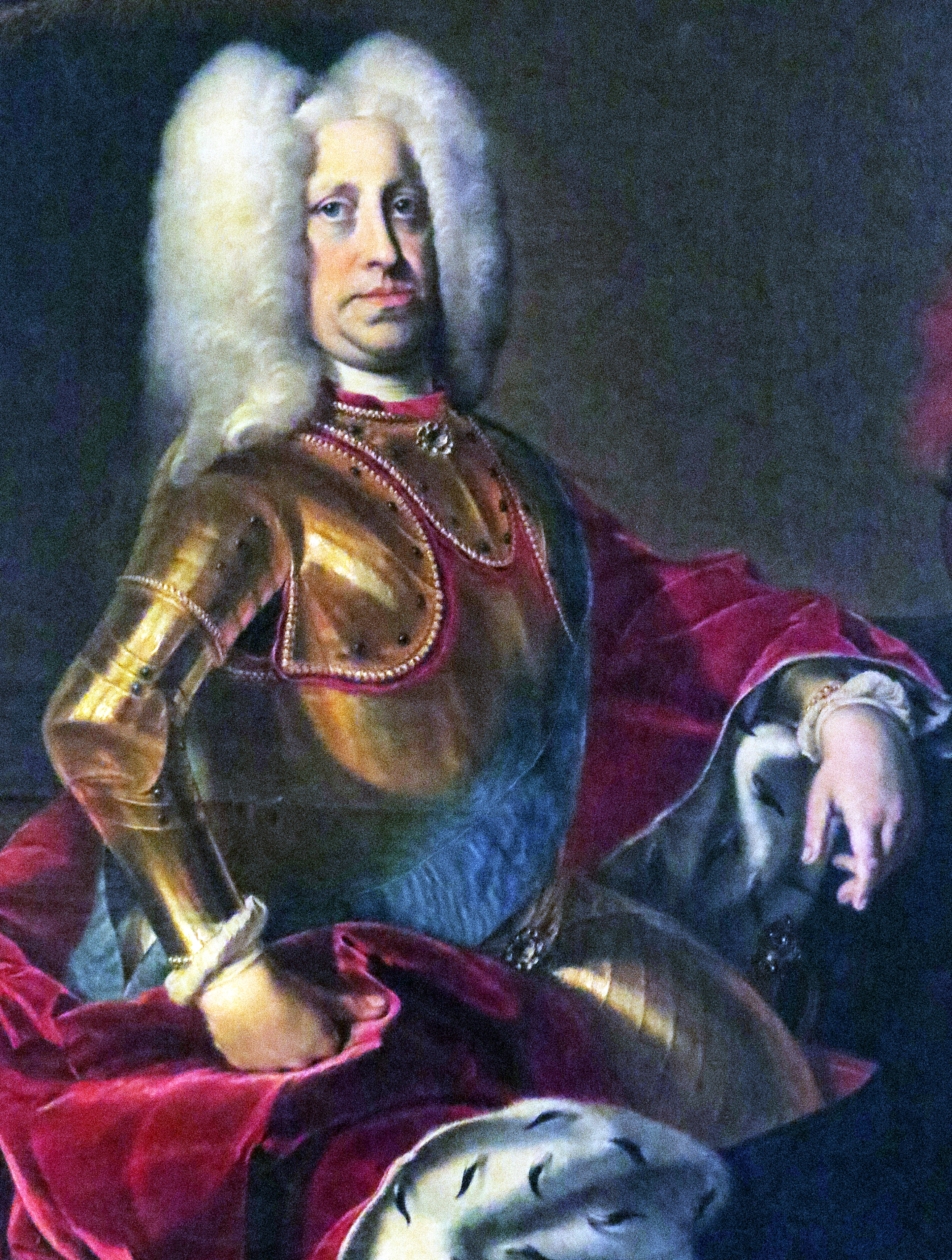 Christian August af Slesvig-Holsten-Gottorp, fyrstebiskop af Lübeck. Udsnit af maleri af ukendt kunstner. Sønderborg Slot